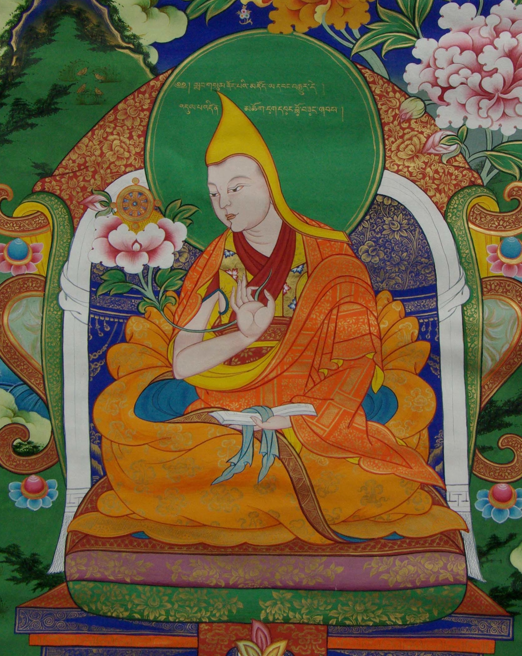 The Tenth Kirti, Ngawang Lobzang Tenpa Tsering b.1921 - d.1941